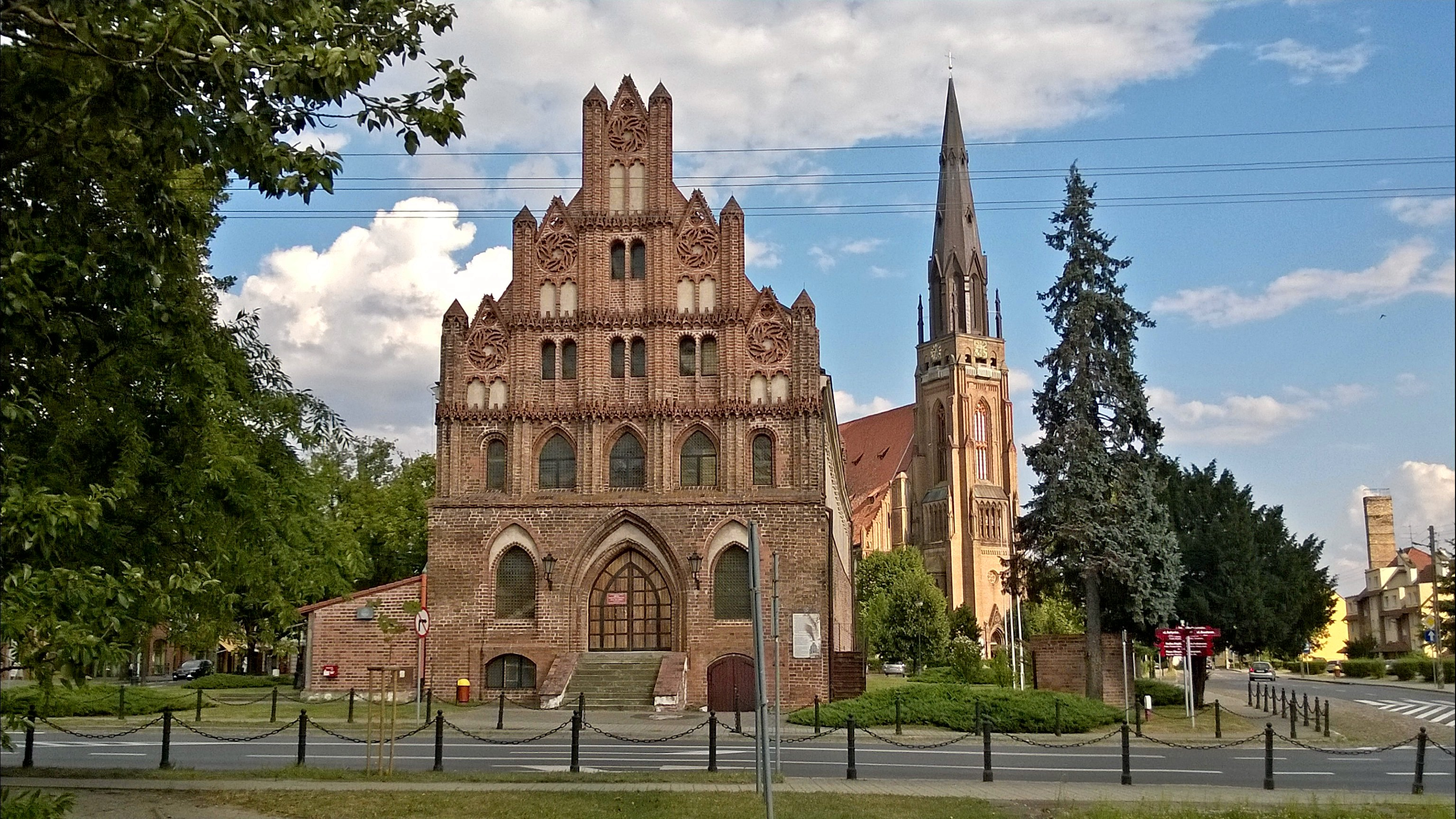 Chojna